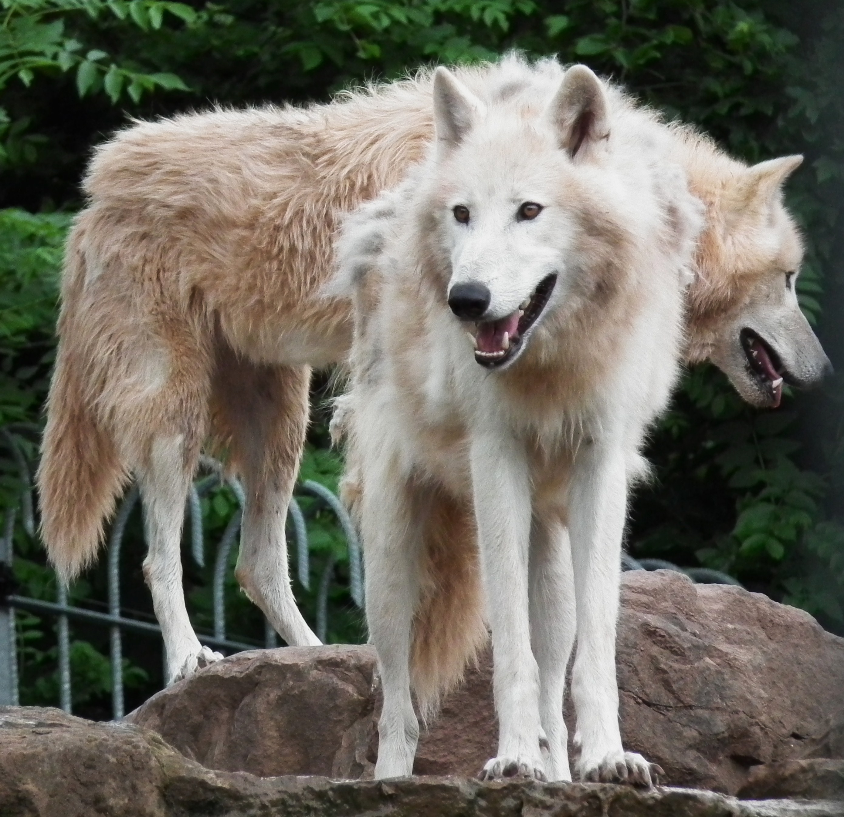 Polarwolf (Canis lupus arctos) im Wildpark Tripsdrill (Baden-Württemberg, Deutschland)